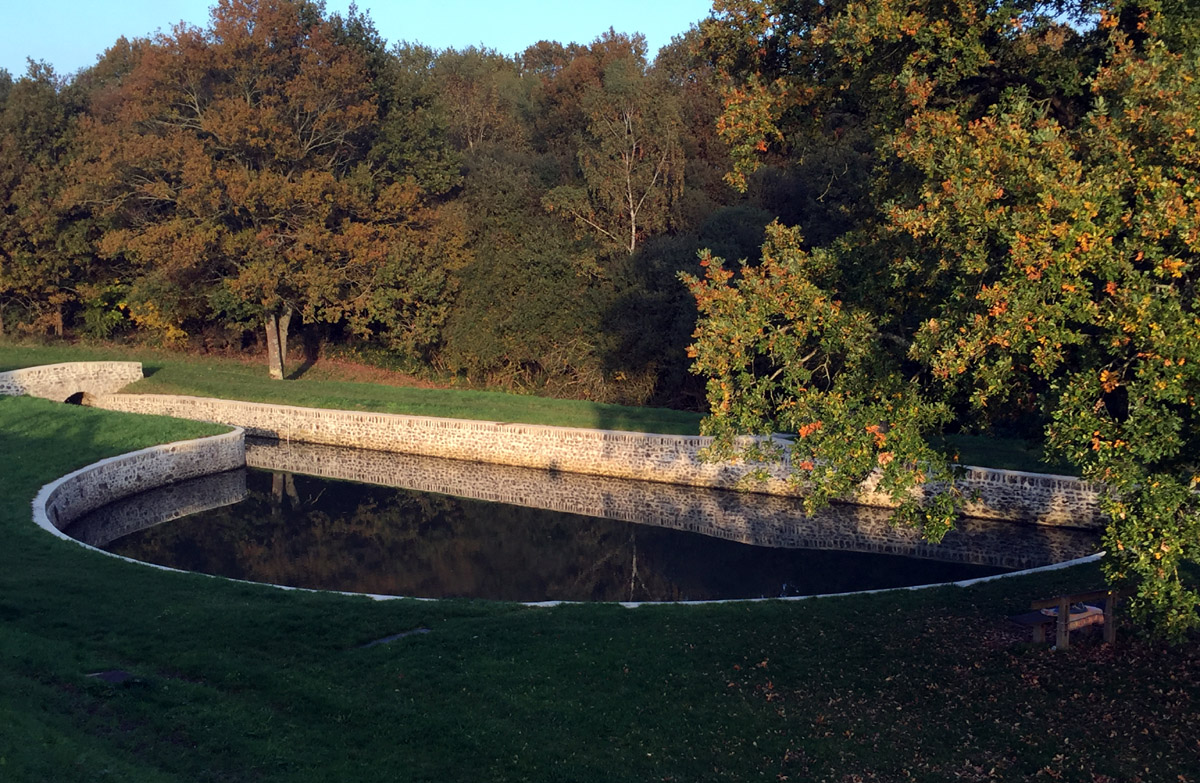 Haricot de l'Etang du Perray en Yvelines